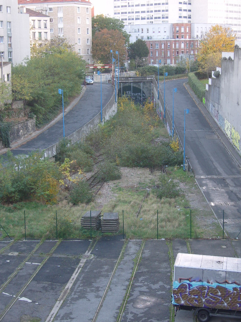 Ancienne gare des Gobelins, Paris 13e, vue en direction de la Petite Ceinture